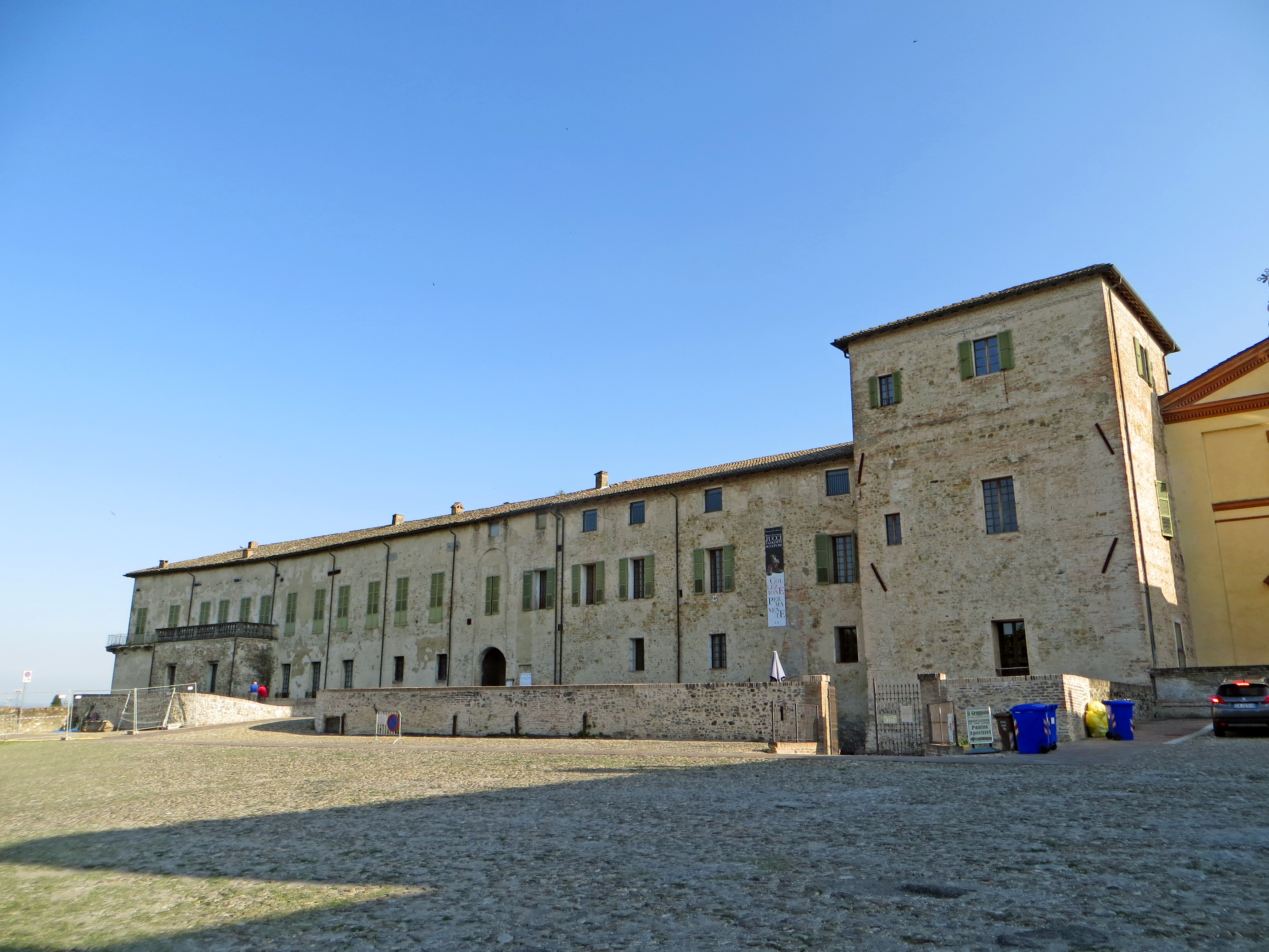 Rocca Sanvitale (Sala Baganza) - facciata This is a photo of a monument which is part of cultural heritage of Italy.